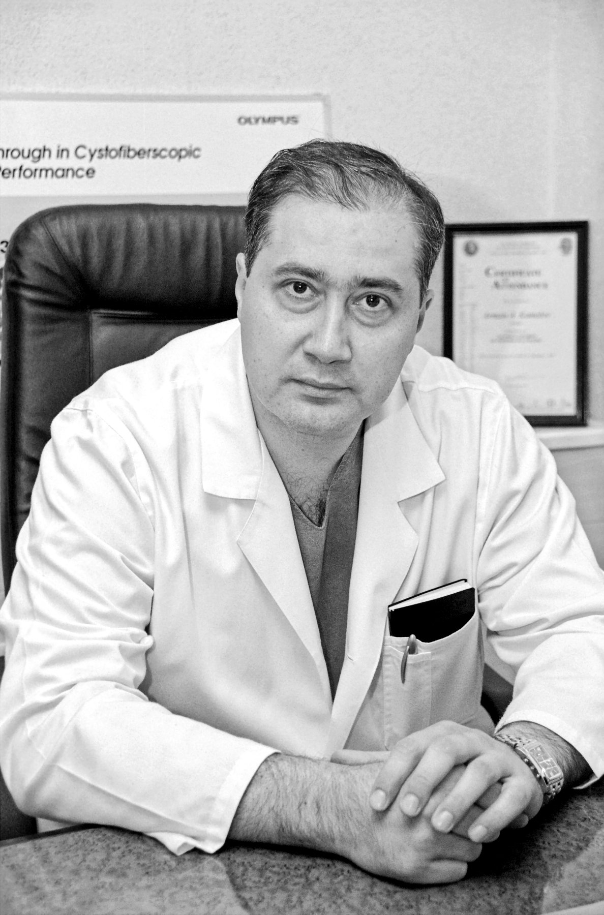 Армаис Альбертович Камалов — доктор медицинских наук, профессор, заведующий отделом андрологии НИИ урологии.